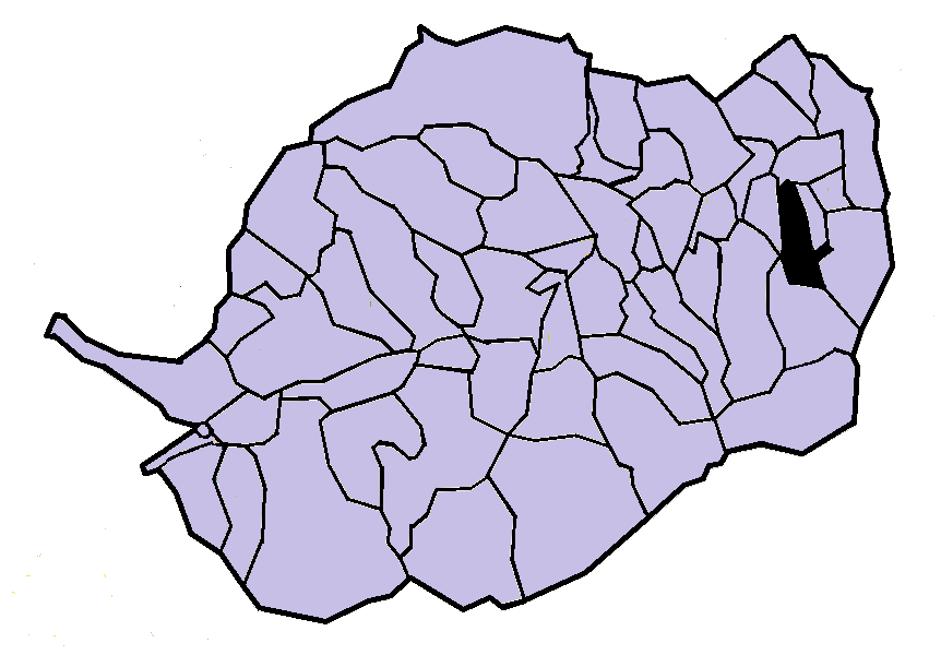 Finestret en el Conflent, a partir del mapa municipal del Conflent de lliure disposició adaptat al Nomenclàtor toponímic aprovat el 2007